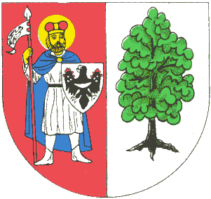 Horní Lideč - znak obce.